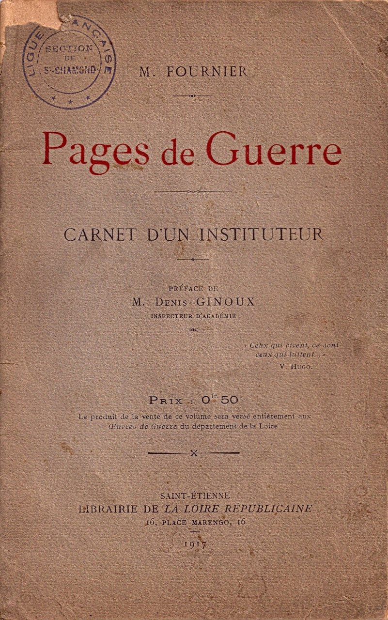 Mathieu Fournier, Pages de guerre. Carnet d'un instituteur, 1917.